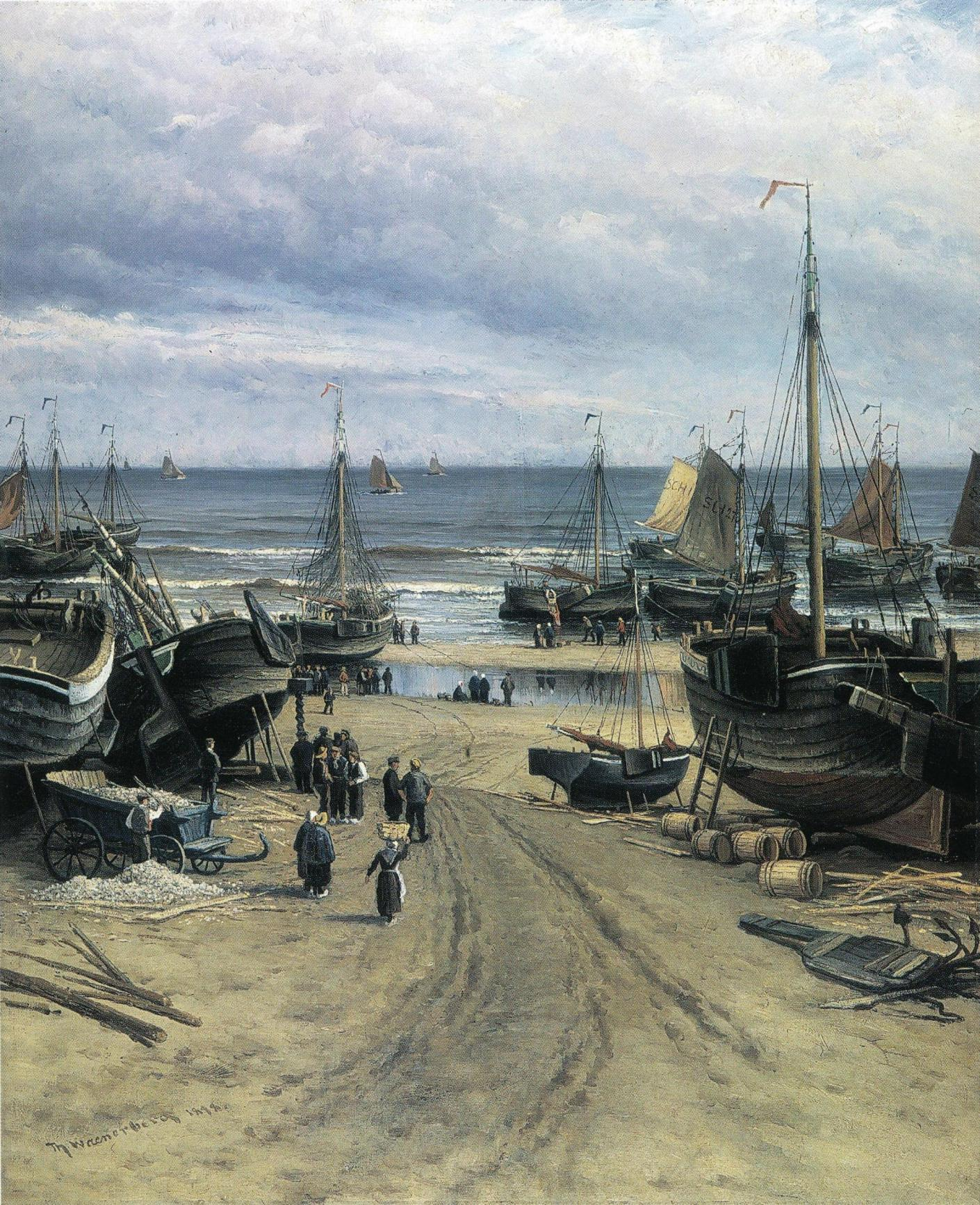 Thorsten Waenerbergin maalaus. Maalauksen omisti aikoinaan Viipurin taidemuseo, nykyään Hämeenlinnan taidemuseo.